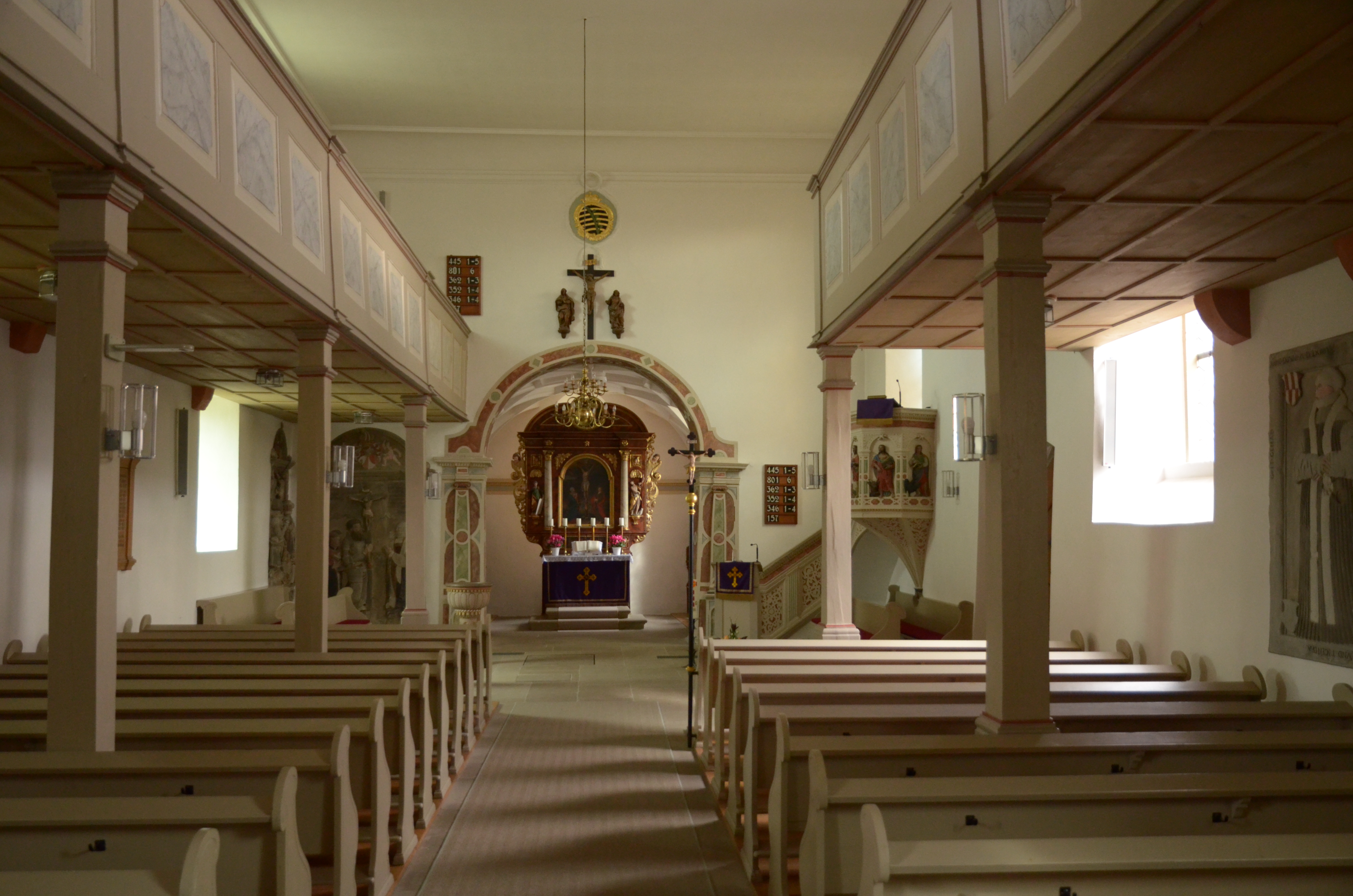 evang.-luth. Kirche St. Bartholomäus in Maßbach Innenraum